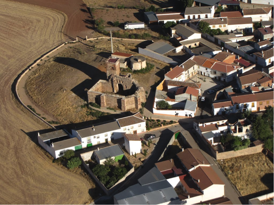 Vista aérea del Castillo-Iglesia de Santa Catalina, Fuenllana (Ciudad Real, España). Foto: Proyecto Arqueológico 'Santa Catalina'.